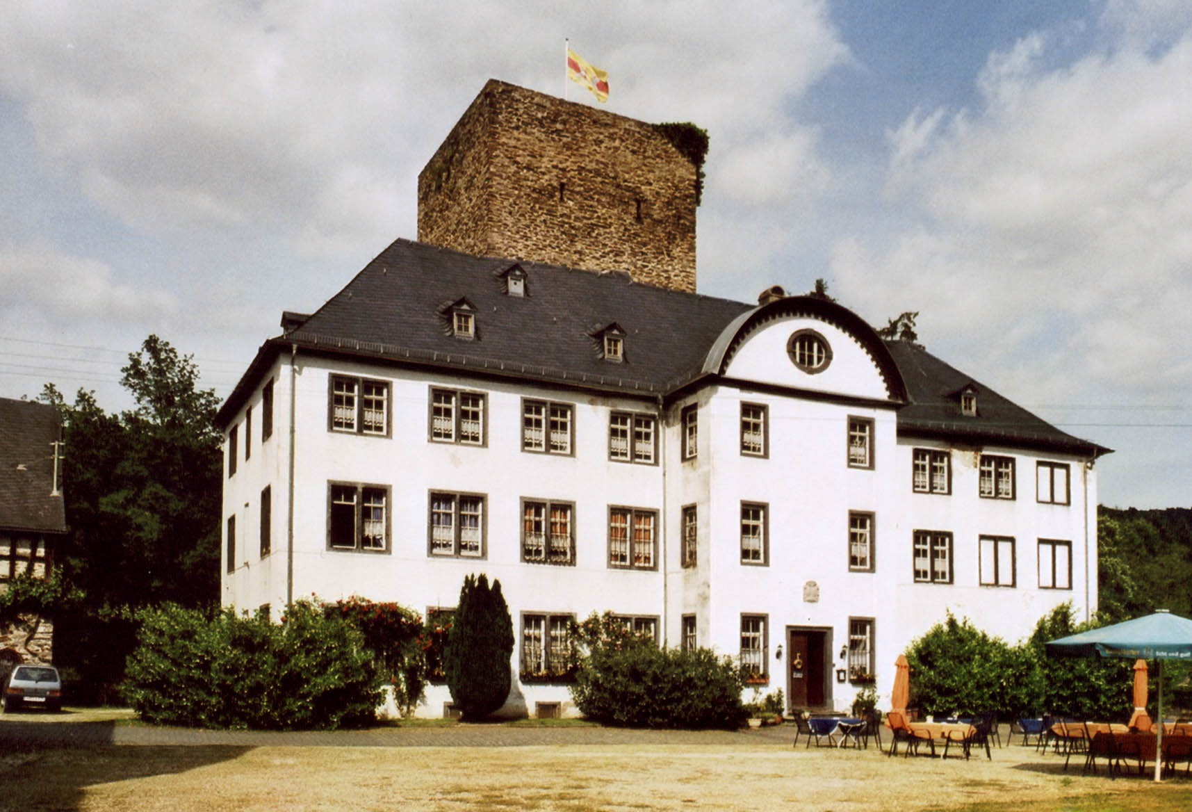 Schlossgebäude